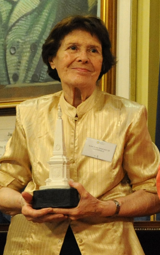 Presidente argentina Cristina Fernández entrega Premio Extraordinario Bicentenario de la Revolución de Mayo a los Derechos Humanos a Madres y Abuelas de detenidos desaparecidos por la última dictadura militar argentina.